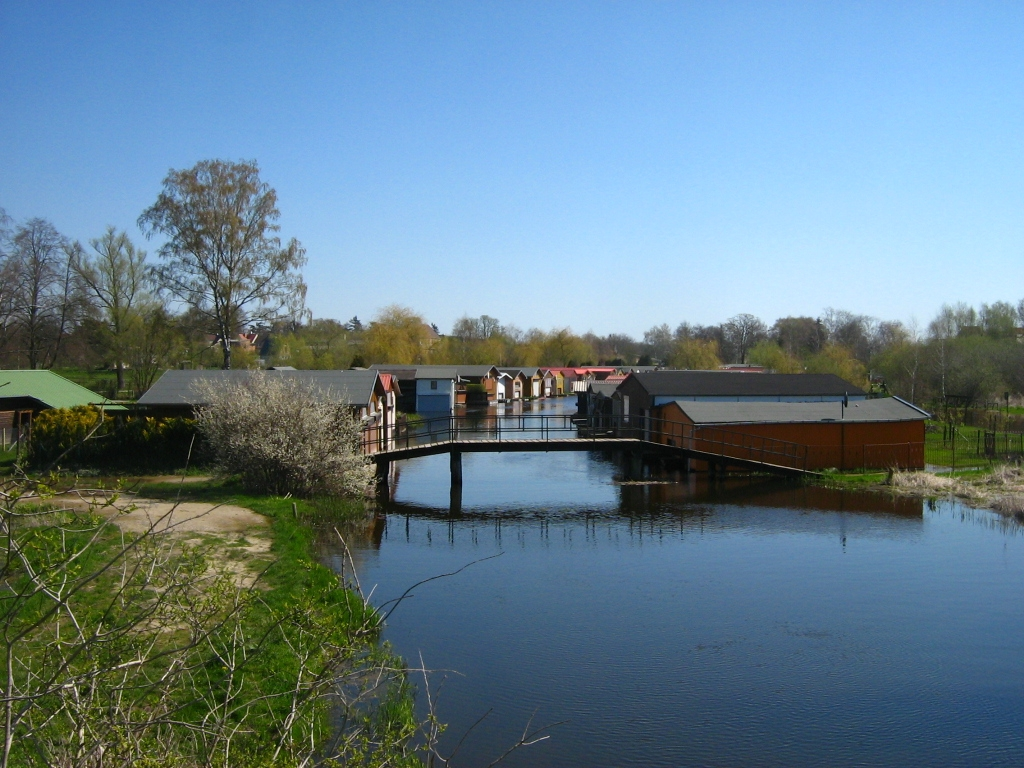 Die Peene in Neukalen (Landkreis Demmin, Mecklenburg-Vorpommern)